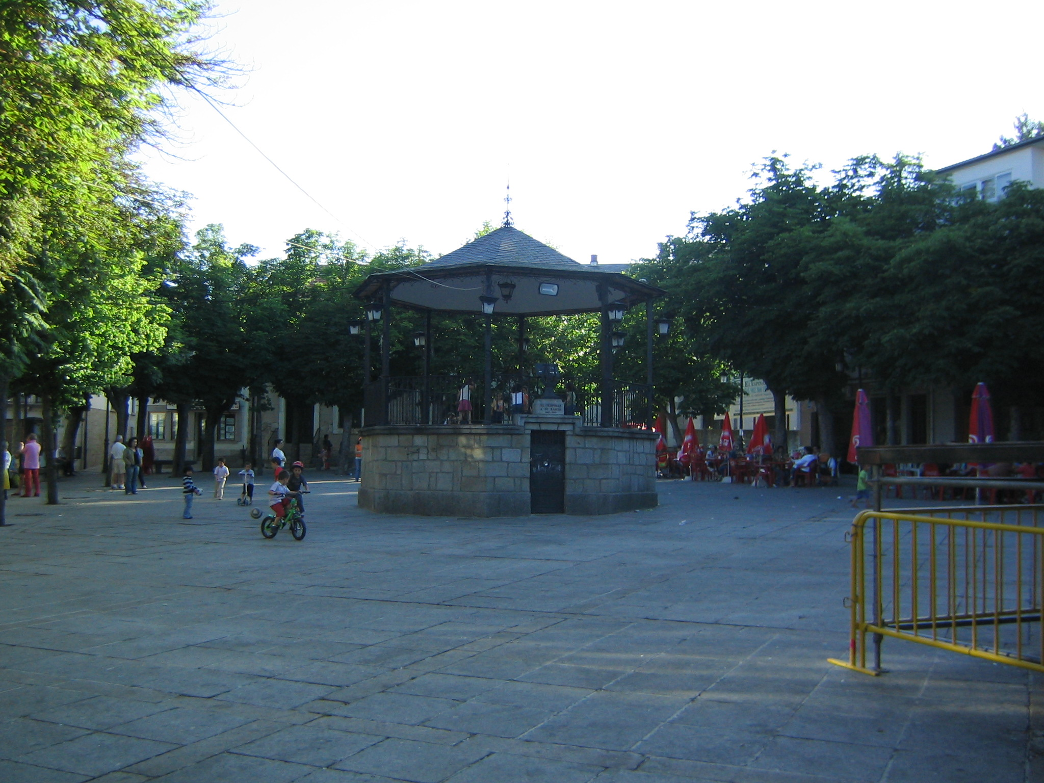 El Espinar, Segovia España. Plaza de la Corredera.